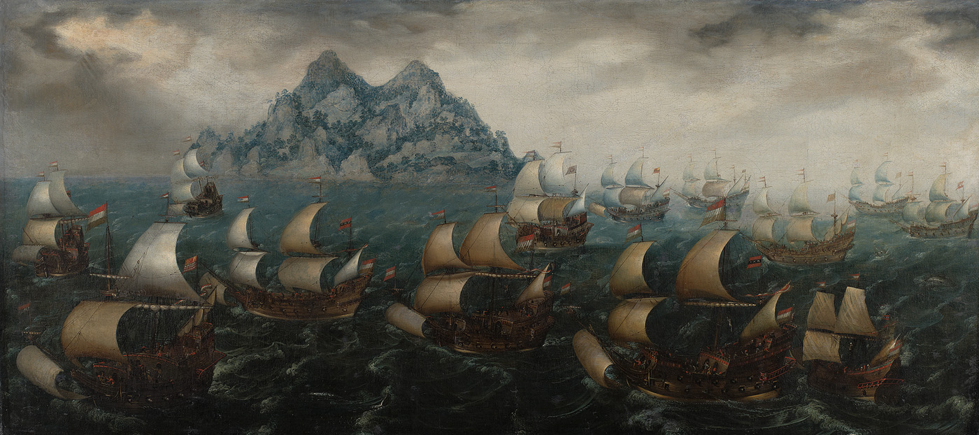 schilderij; scheepvaart; Verenigde Oostindische Compagnie; landschap; zeegezicht